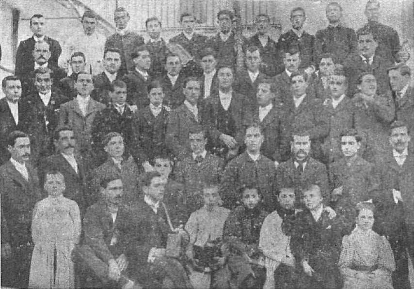 Caramellas del Centro Tradicionalista de Olesa de Montserrat